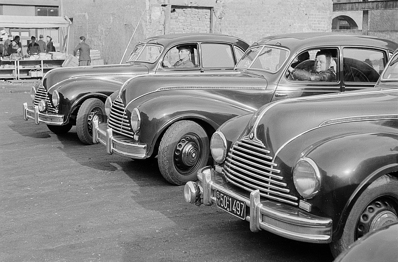 Original image description from the Deutsche Fotothek Vorder- und Seitenansicht parkender BMW 340